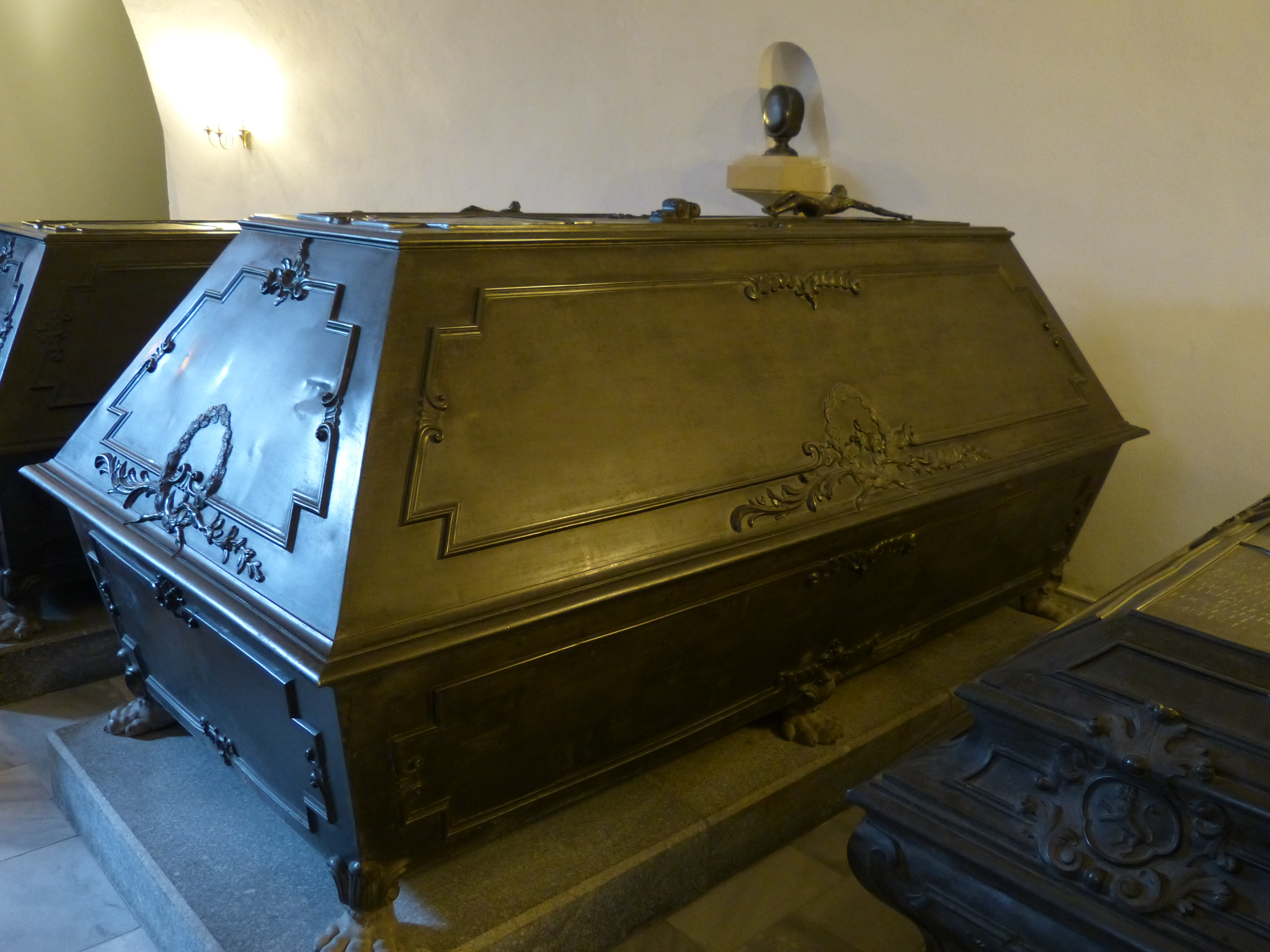 Stiftergruft der Wettiner-Gruft der Katholischen Hofkirche in Dresden, Sachsen